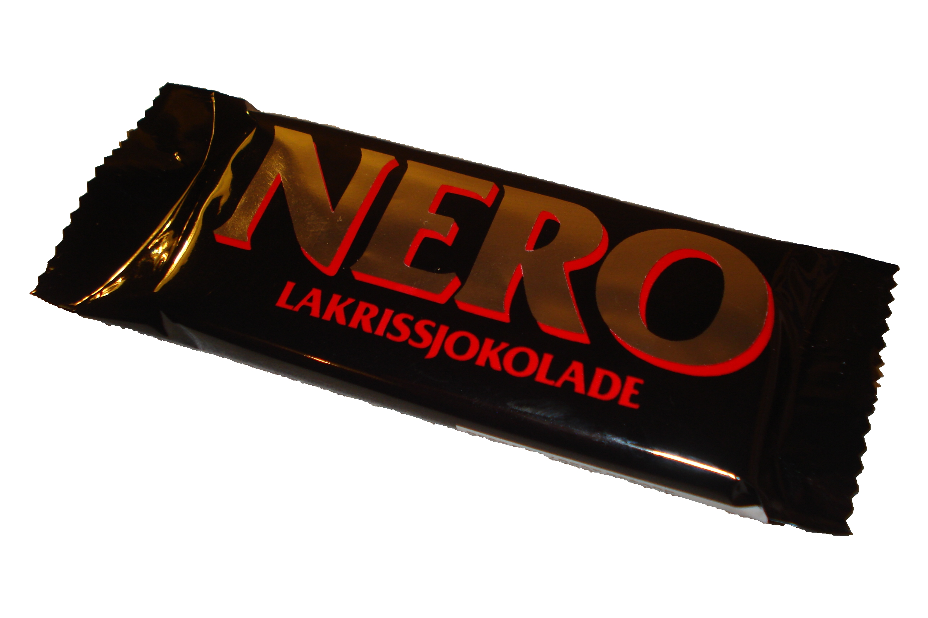 Eit bilete av ein uopna Norsk «Nero»-sjokolade.